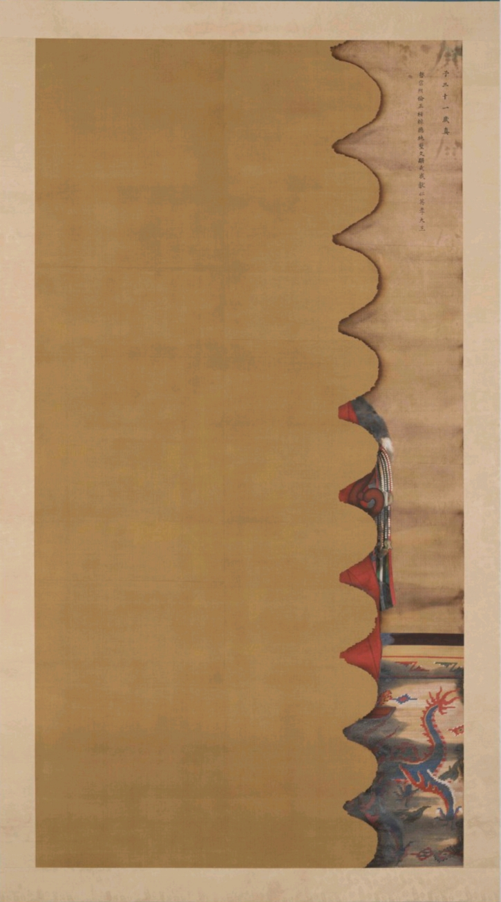 Portrait assis d'un roi inconnu de la dynastie Joseon